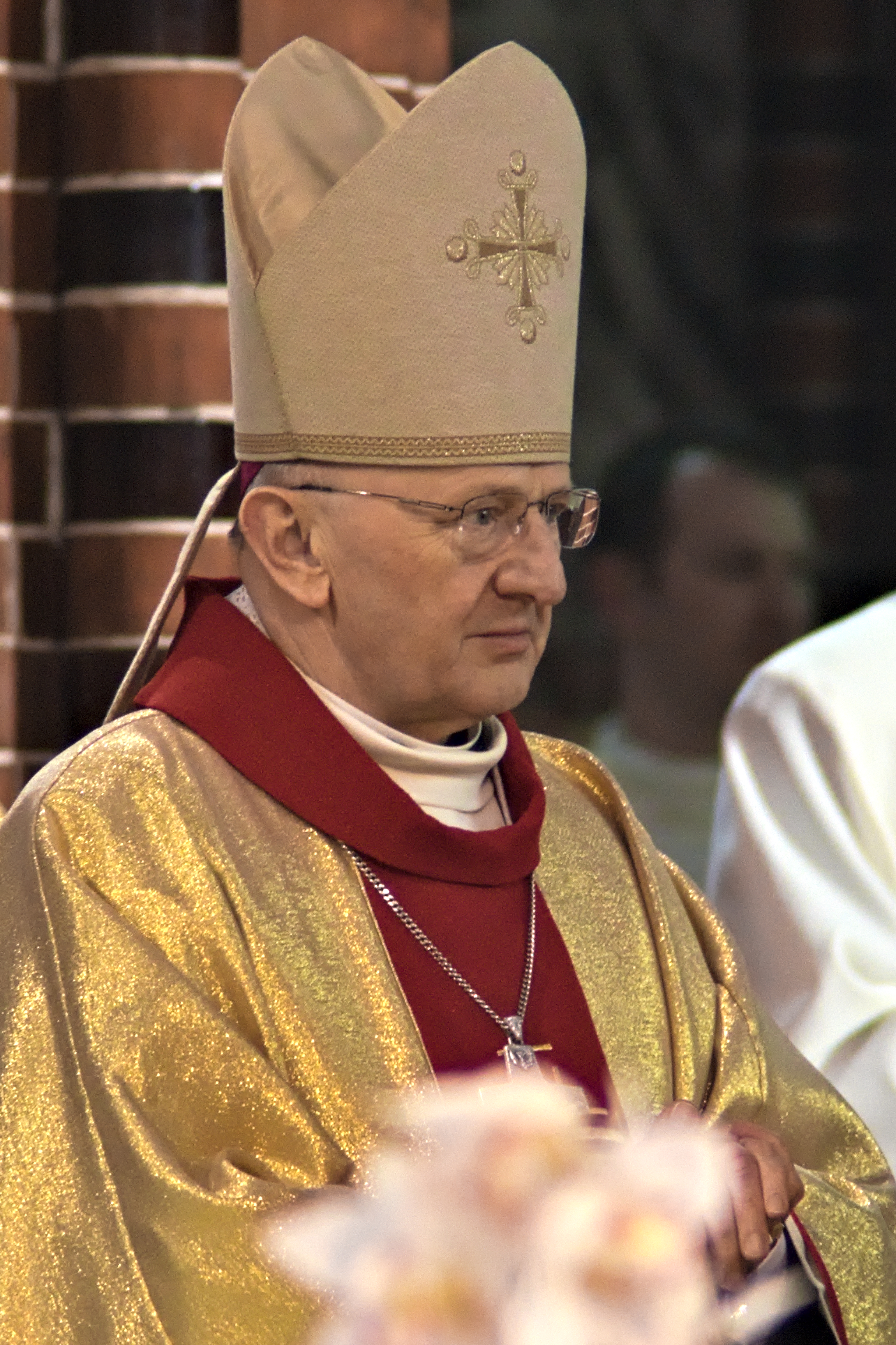 Paweł Stobrawa (1947– ) biskup pomocniczy opolski na uroczystej mszy świętej, podczas której świętowano 85. rocznicę urodzin biskupa seniora Jana Wieczorka w katedrze Świętych Apostołów Piotra i Pawła w Gliwicach